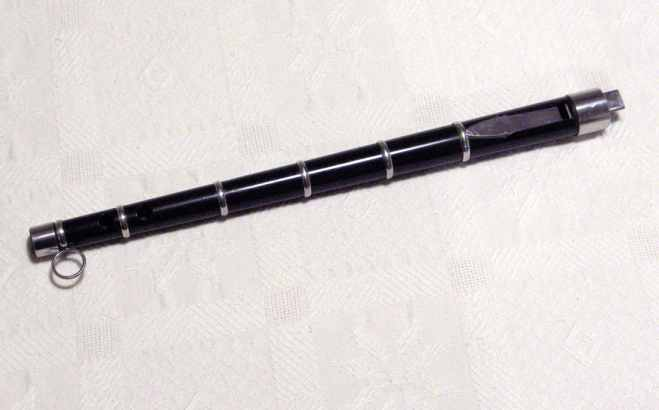 Txistu